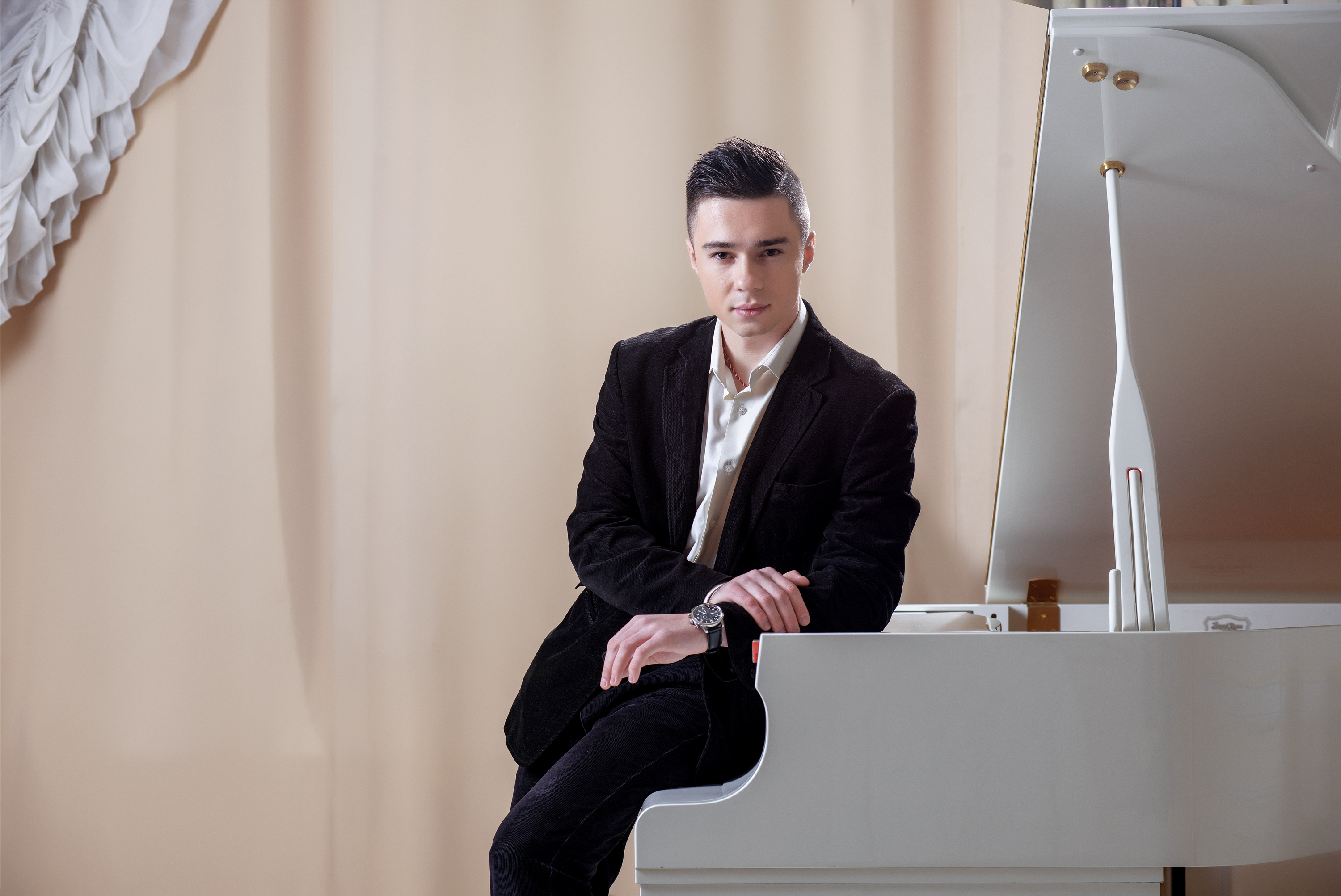 Композитор - Ярослав Олійник